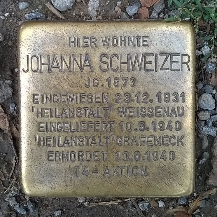 Stolperstein für Johanna Schweizer in D-70839 Gerlingen, Weilimdorfer Straße 9 (Stadtmuseum)